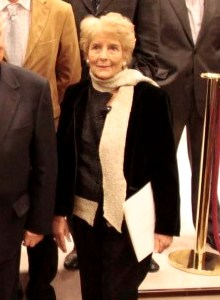 Luz Pozo Garza no 2013 no plenario da RAG.